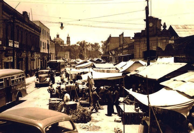 Fotografía tomada en 1940